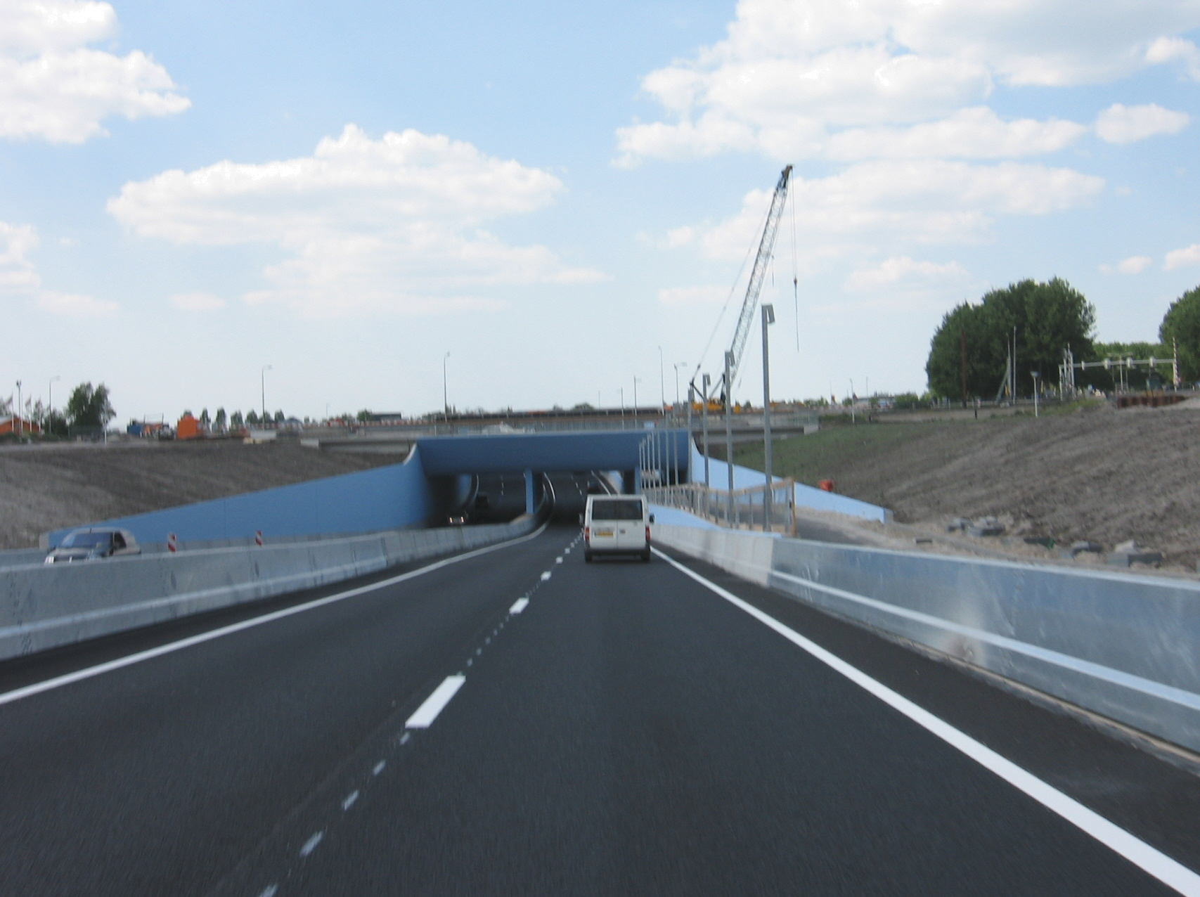 Geau-akwadukt (Aquaduct De Geeuw), canal aqueduct in Sneek